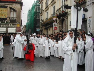 Autore nasso vincenzo. fonte nasso vincenzo. momento della processione dei misteri rilasciata sotto licenza Creative commons attribution requireda share alike con ticket Ticket#2008040510008971 da